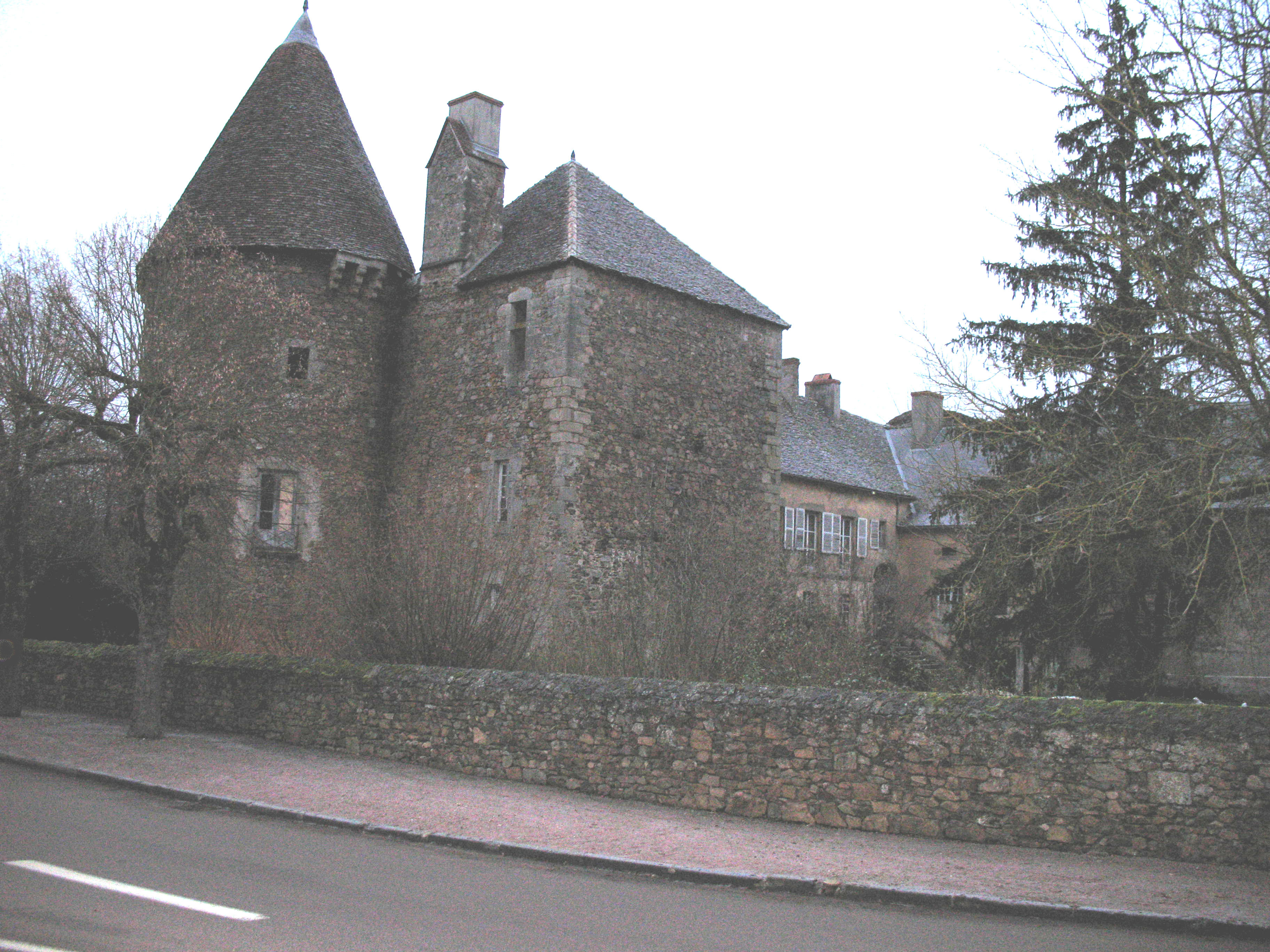 Château de Chissey-en-Morvan (Saône-et-Loire)